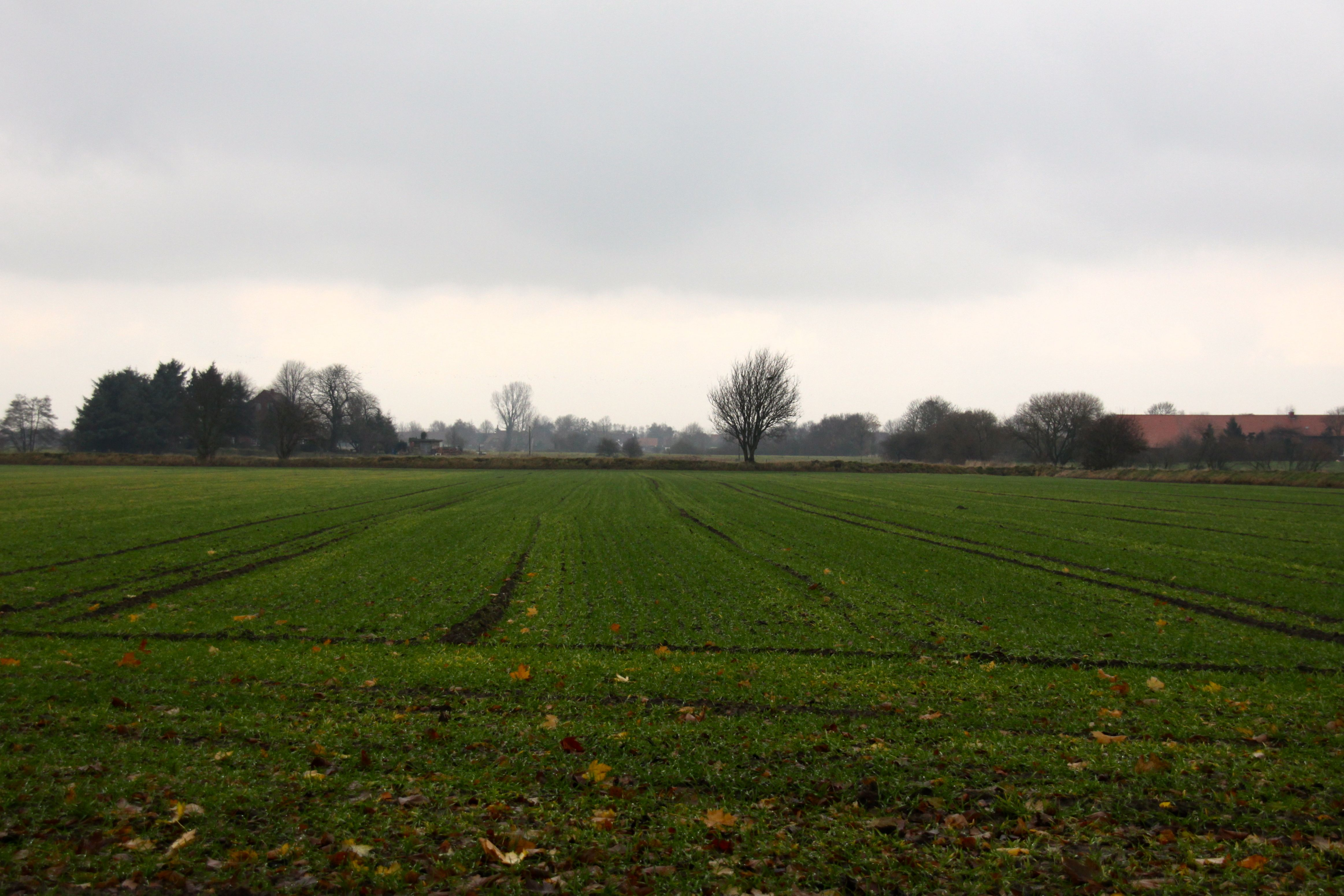 Wüstung des ehemaligen Klosters Pansath